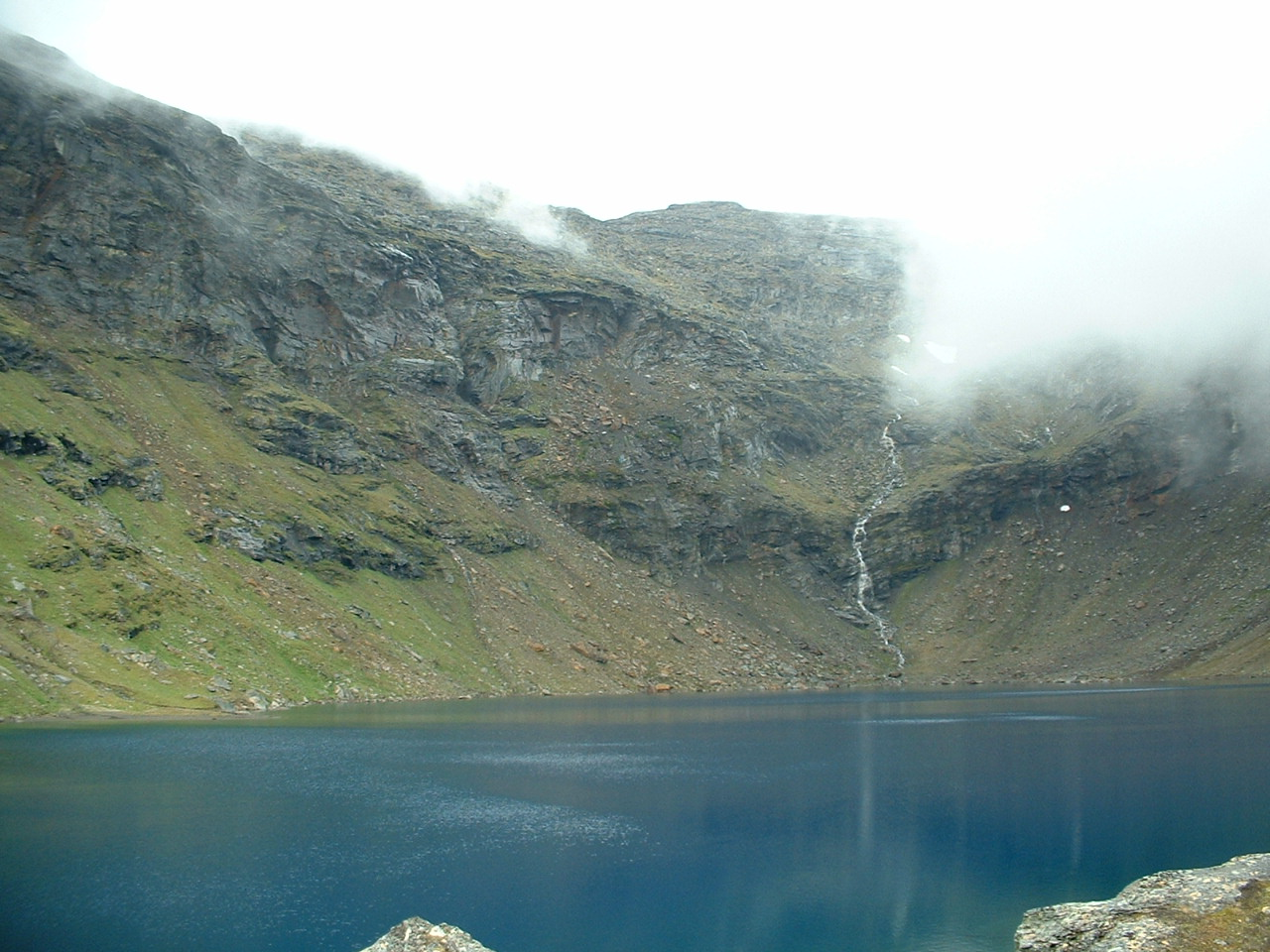 Trollsjön (Rissajavri) in Kiruna municipality